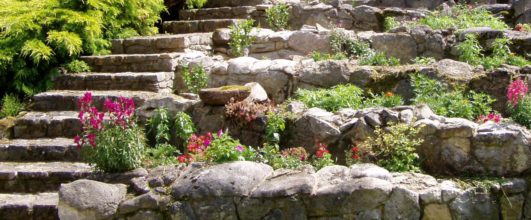 Steingarten